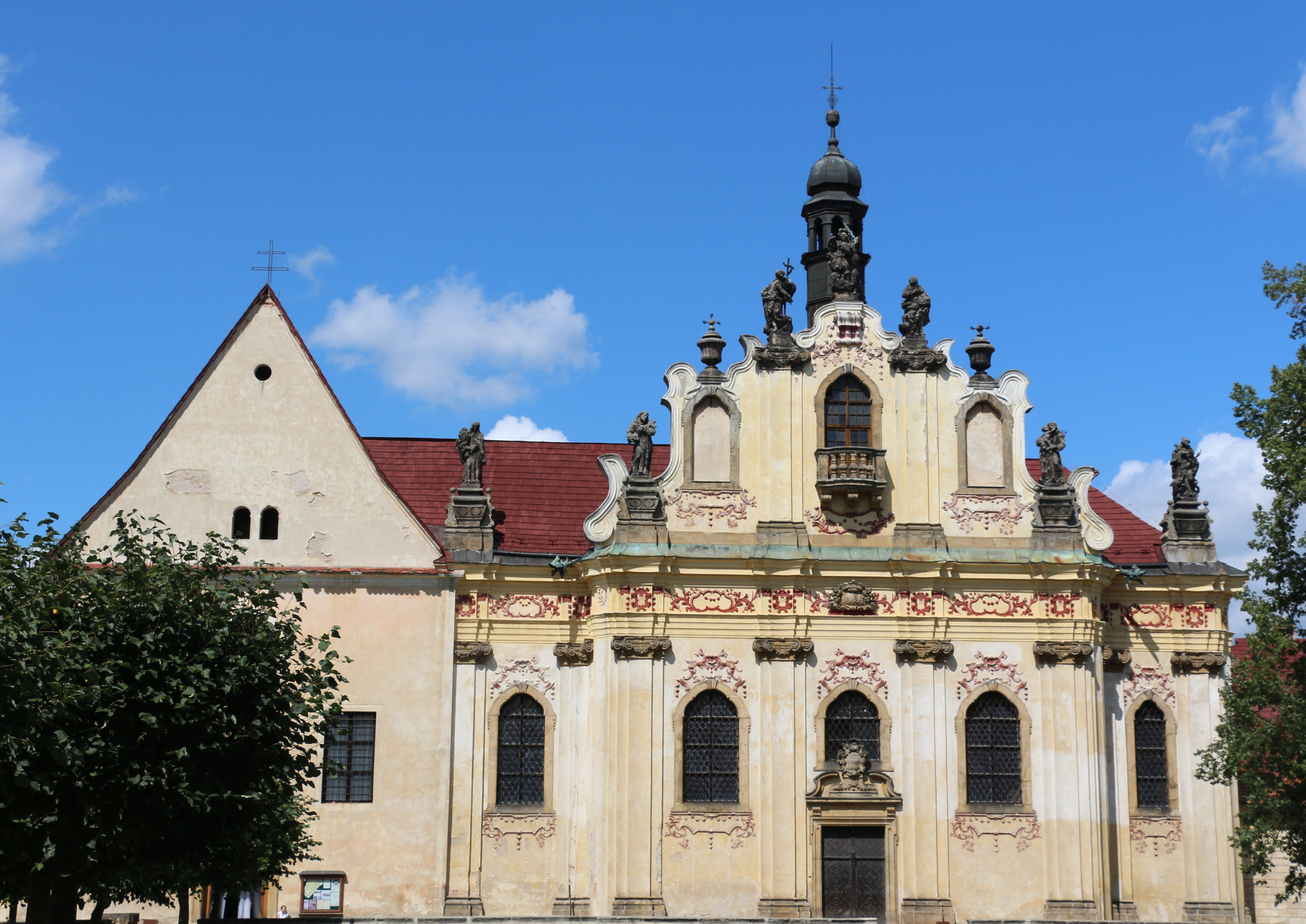 Bývalý kapucínský klášter, V Lípách 151, Mnichovo Hradiště.